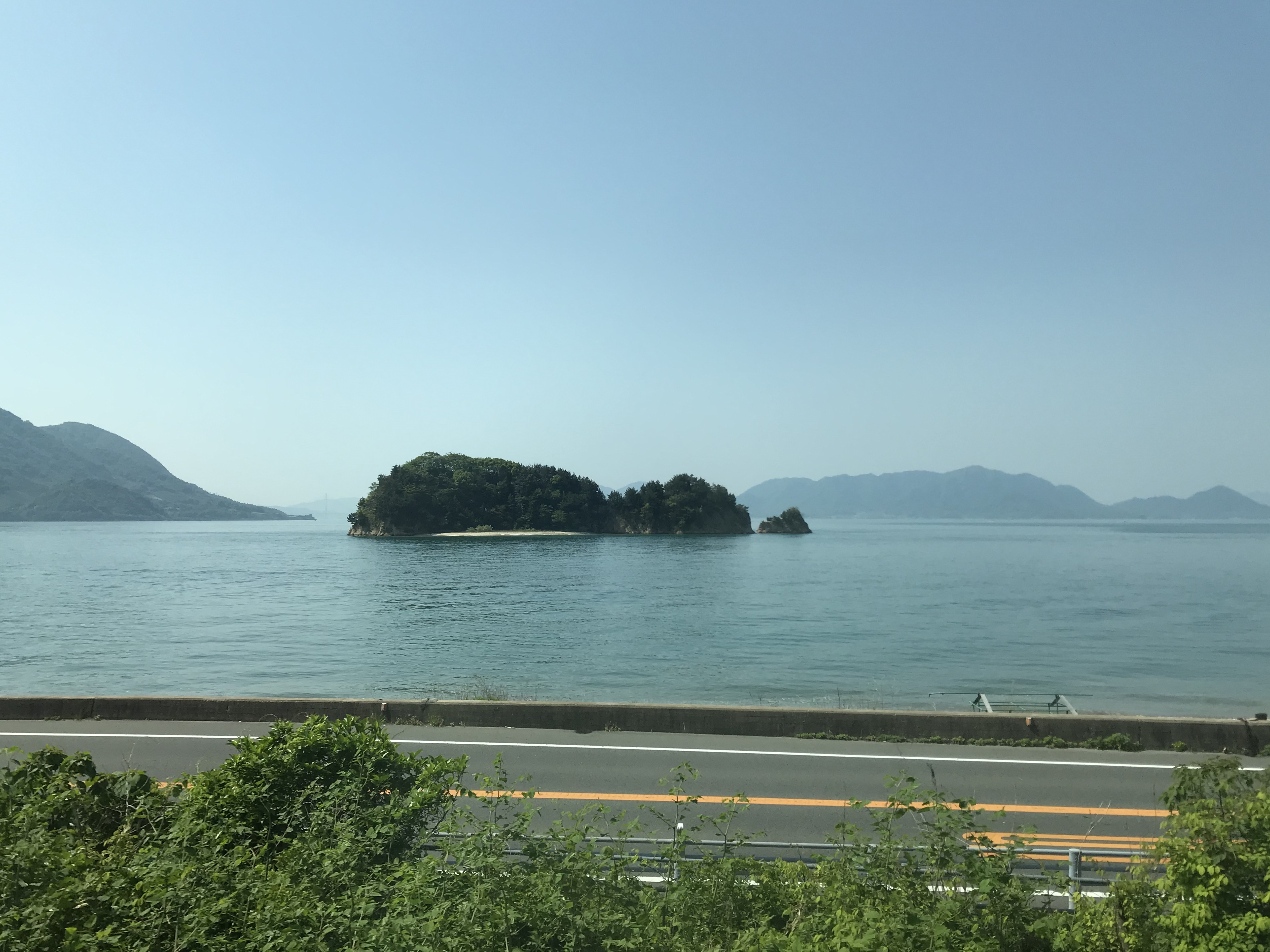 呉線列車内より望む高根島、大三島と有竜島